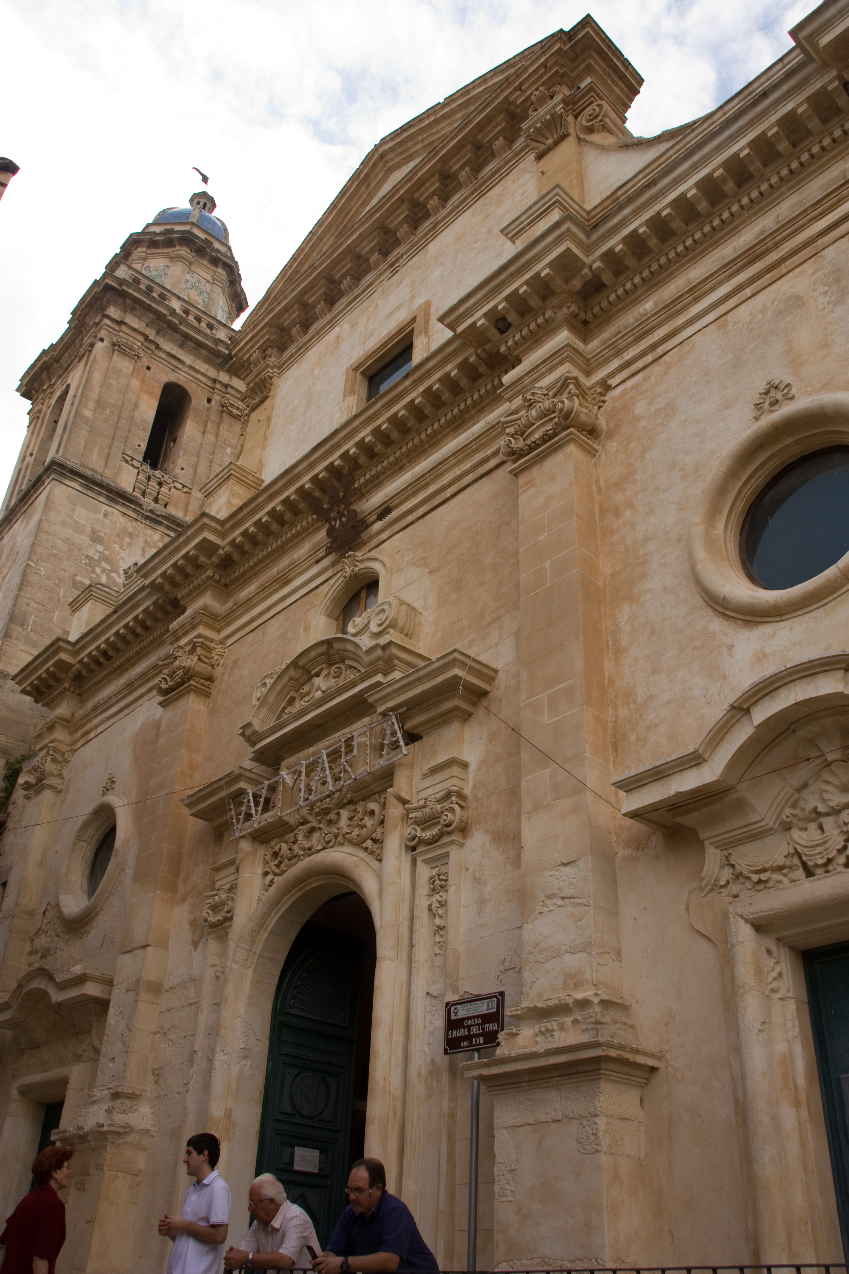 Chiesa Santa Maria dell'Itria, Ragusa Ibla, Sicile, Italie